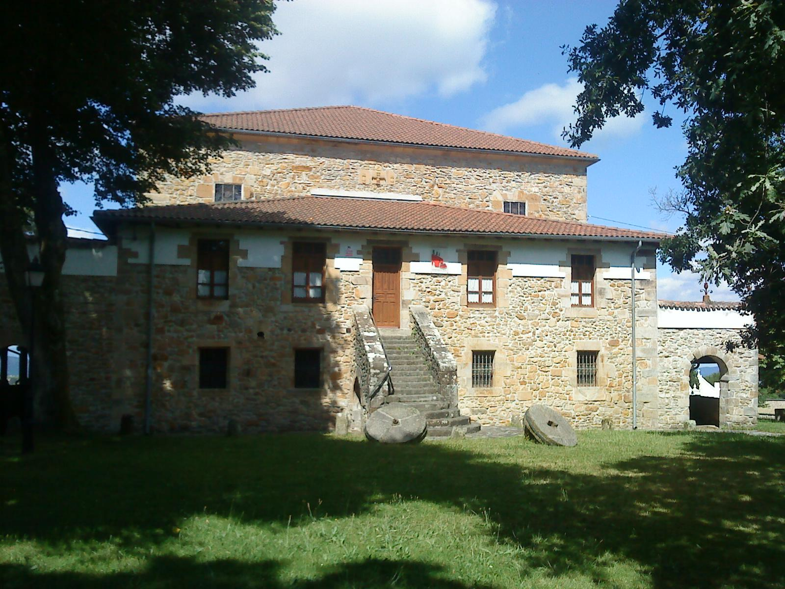 Errigoiti. Iglesia de Santa María de Idoibaltzaga. En Vizcaya, País Vasco (España)